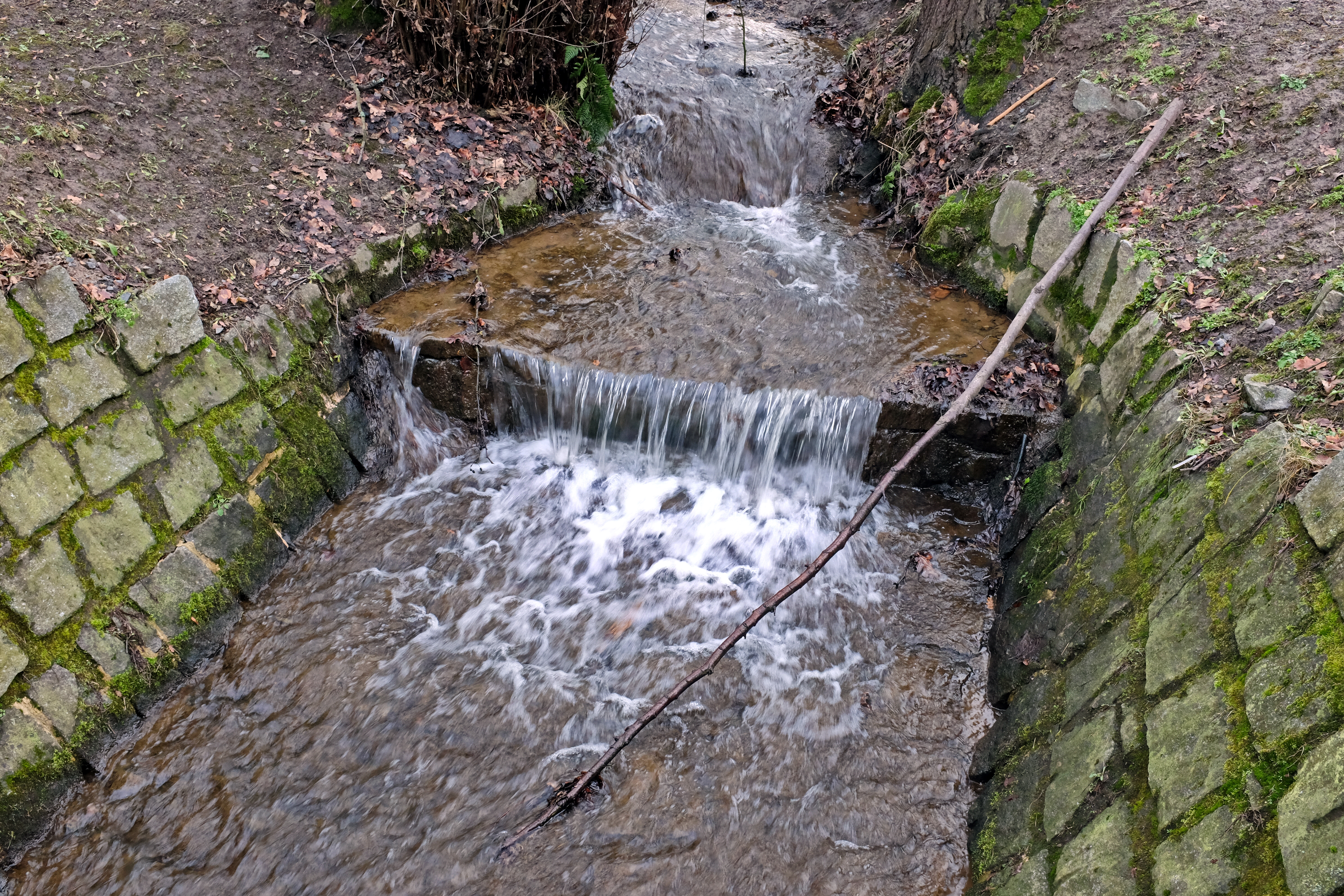 Břehnický potok, přítok Ohře v Chebu